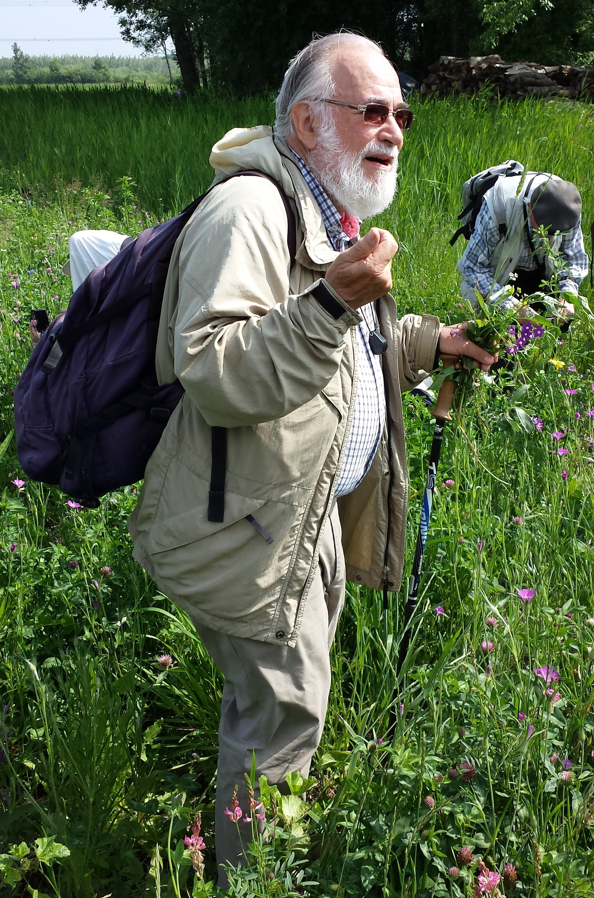 Der Botaniker Manfred A. Fischer auf einer Exkursion zu den Pischelsdorfer Wiesen im Süden Wiens